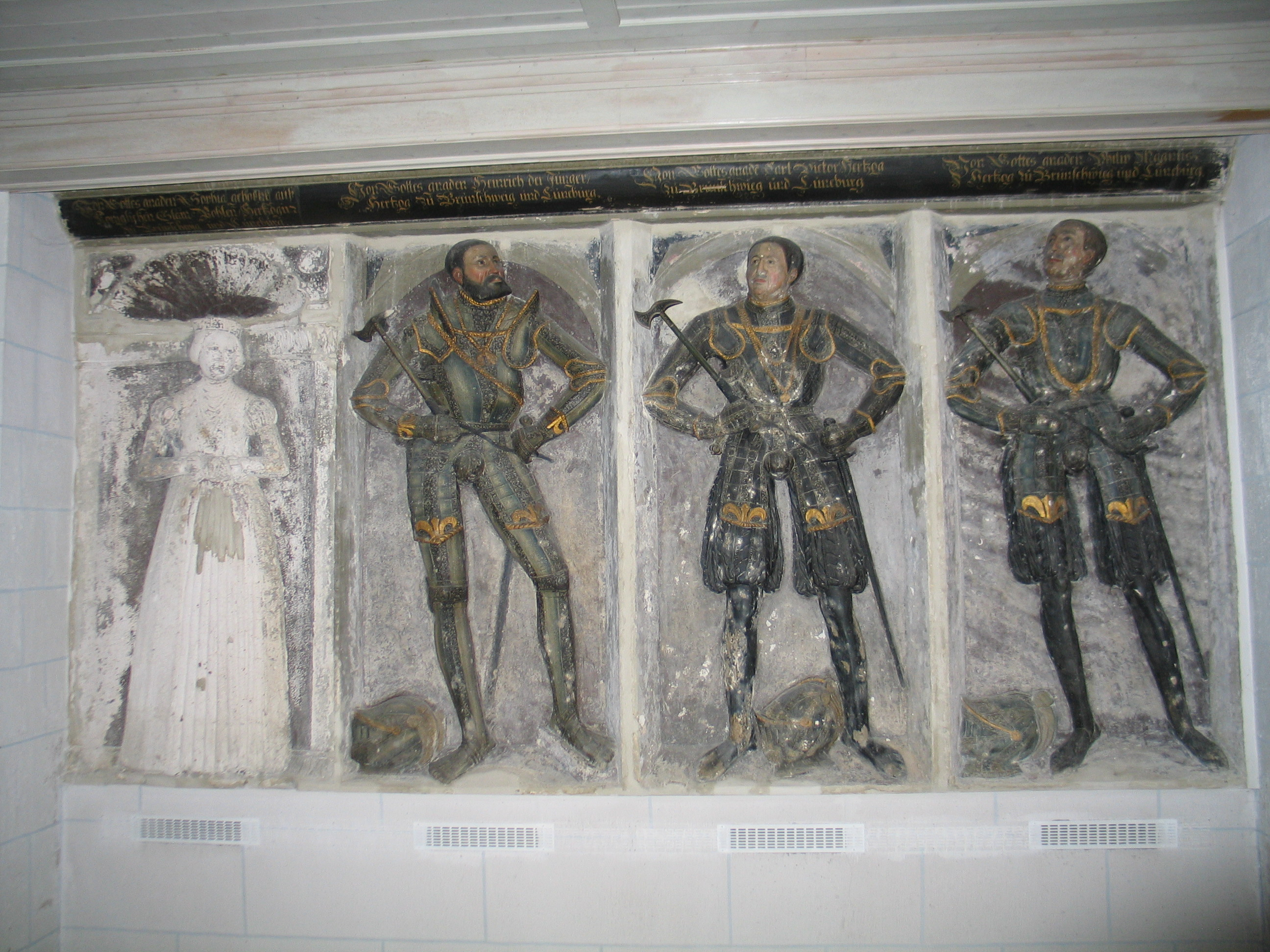 Grabstein Sophia, Heinrich II, Karl Victor und Philipp Magnus in der Marienkirche Wolfenbuettel